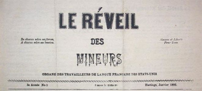 Le Réveil des mineurs est un journal anarchiste et syndicaliste révolutionnaire américain francophone qui parait du 1er novembre 1890 jusqu'à septembre 1893. Il prend la suite du Réveil des masses.